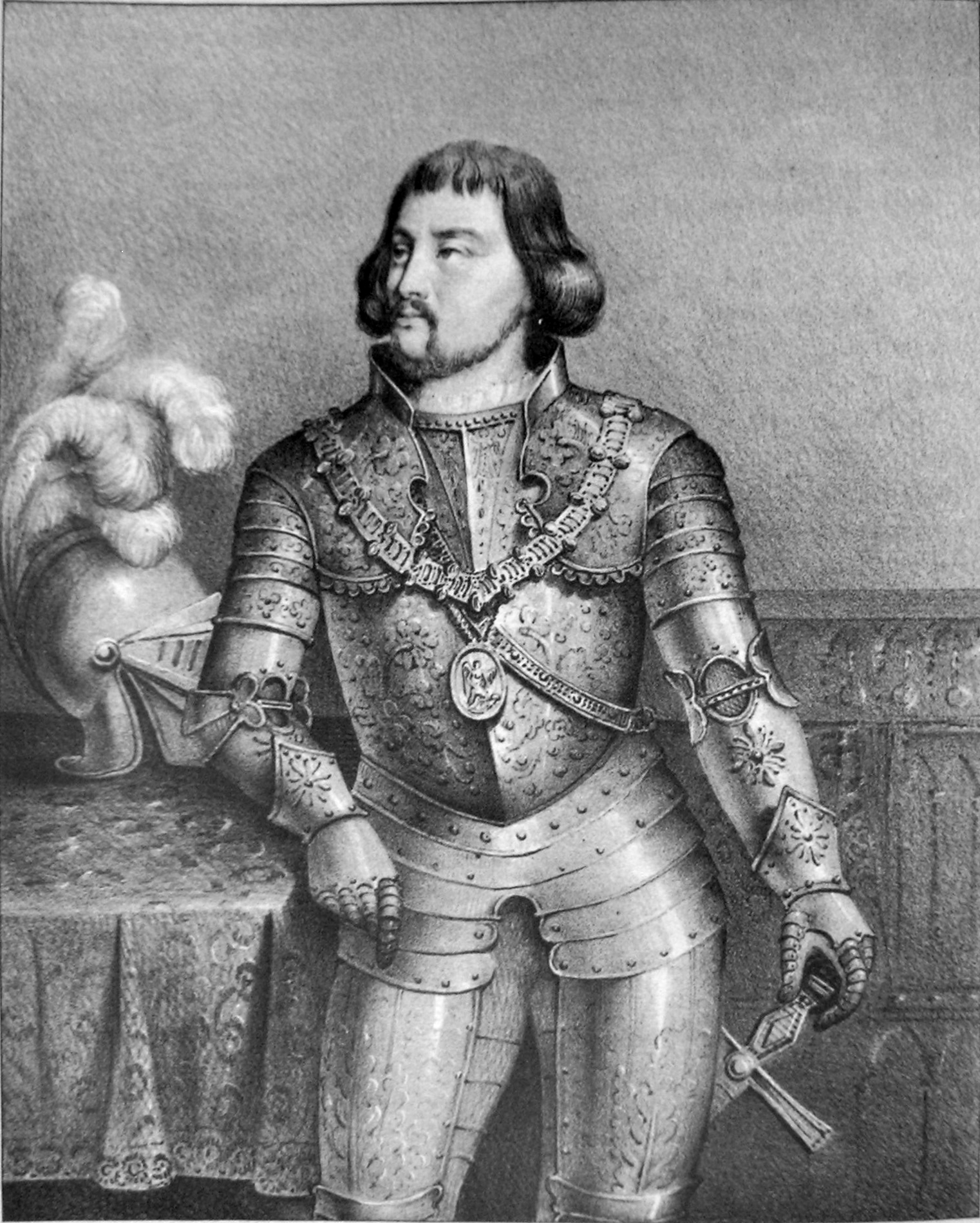 Pierre Terrail de Bayard ATTENTION ! Ce facsimilé est réalisé en applicant des alterations avec un logiciel graphique à une copie numérique, obtenue à partir d'une prise de photo faite par un non-professionnel. Elle pourrait ne pas être parfaitement réussie.